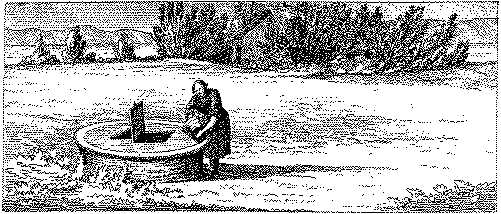 Litho van een tekening die gemaakt is door prof. J.A. de Rijk in 1857 van de Adalbertusput.